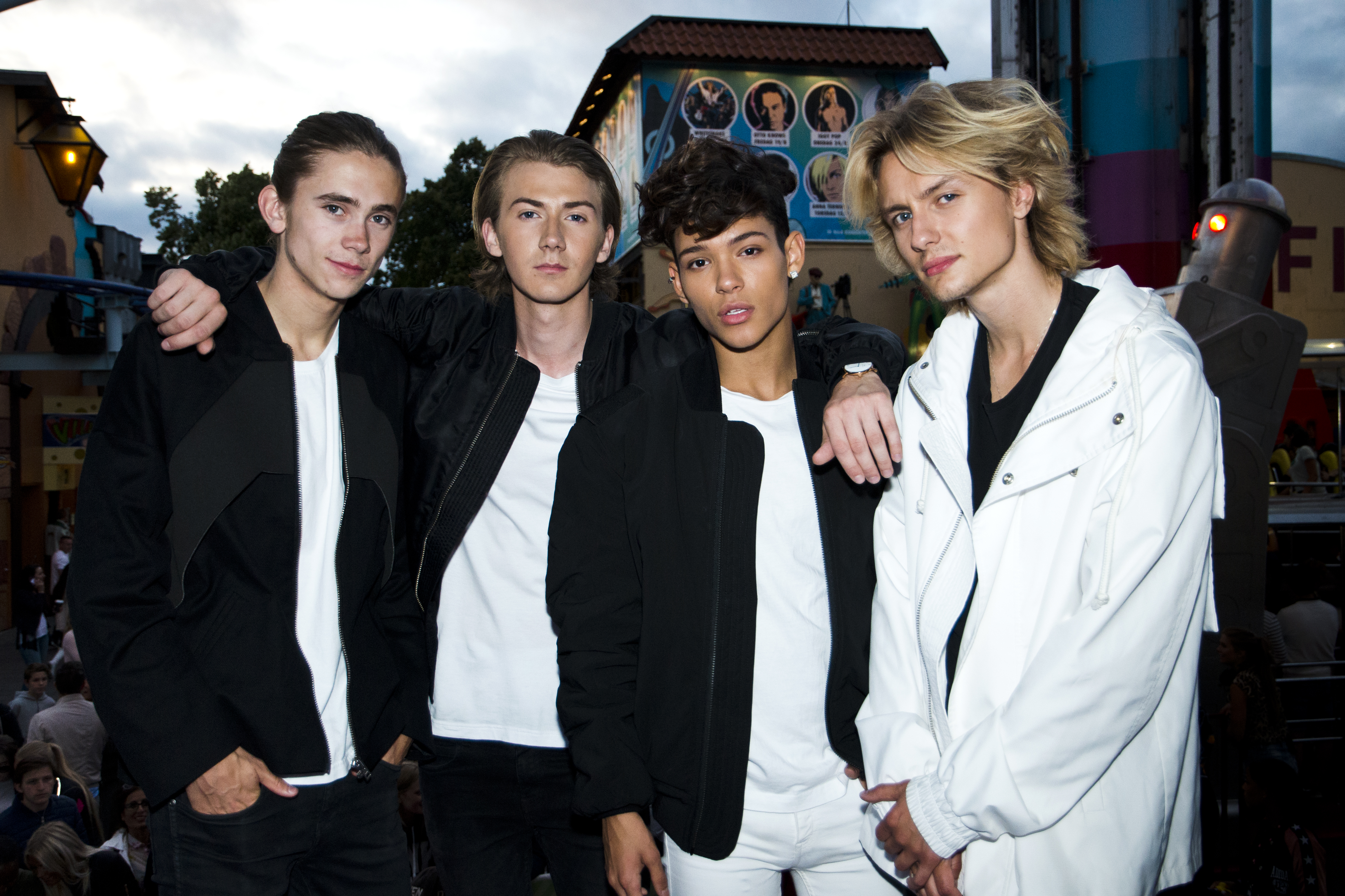 The Fooo Conspiracy på Sommarkrysset, Gröna Lund, Stockholm, Sverige.